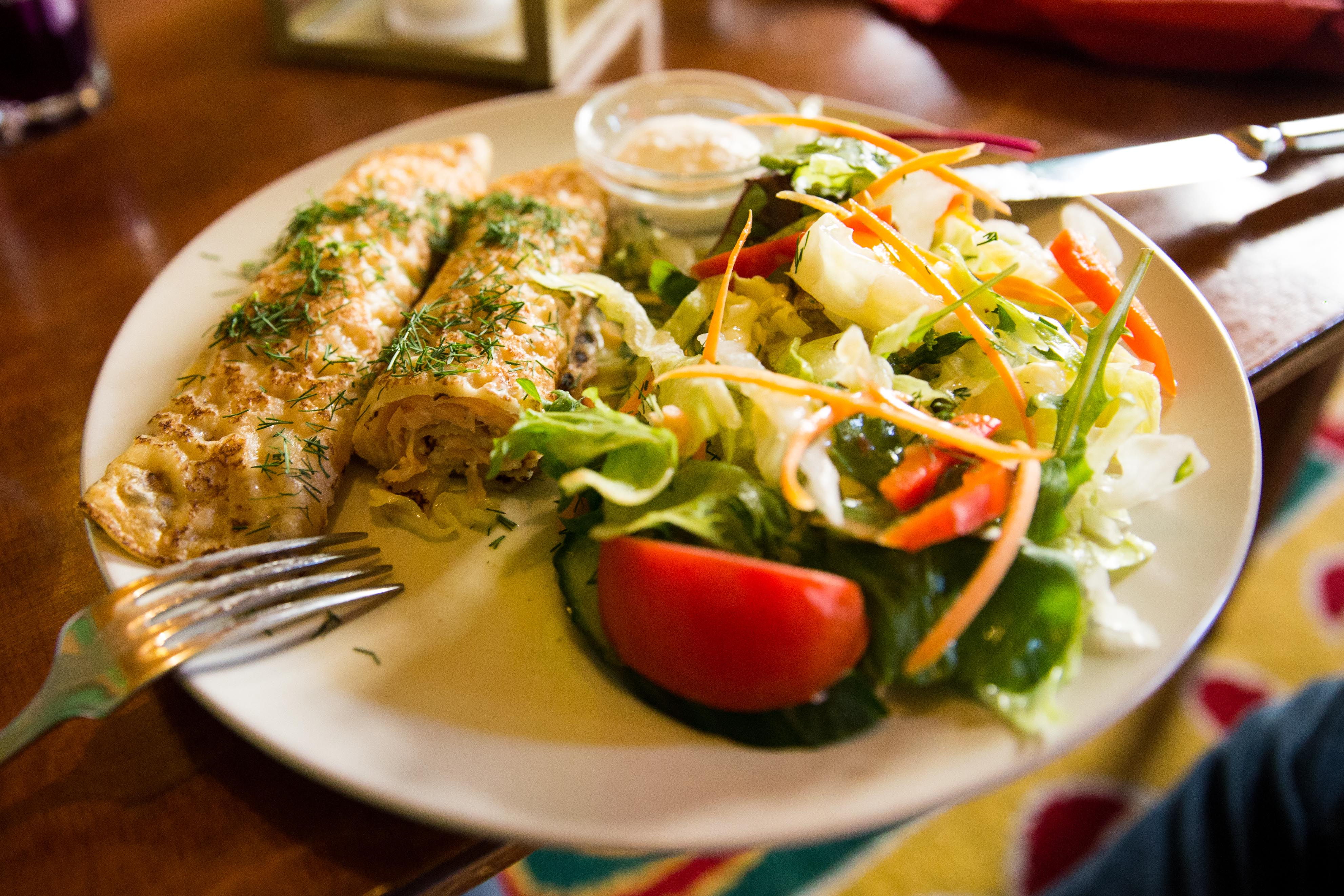 Tadshikische Teestube im Kunsthof (Oranienburger Str. 27, Berlin)